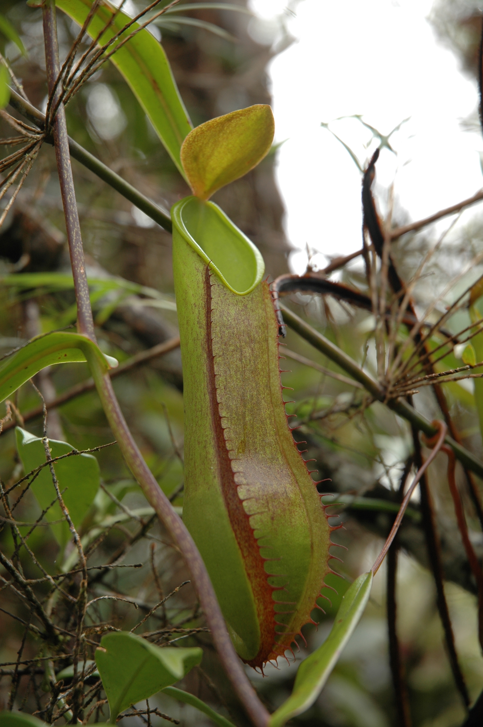 Nepenthes tentaculata Gunung Murud by Jeremiah Harris